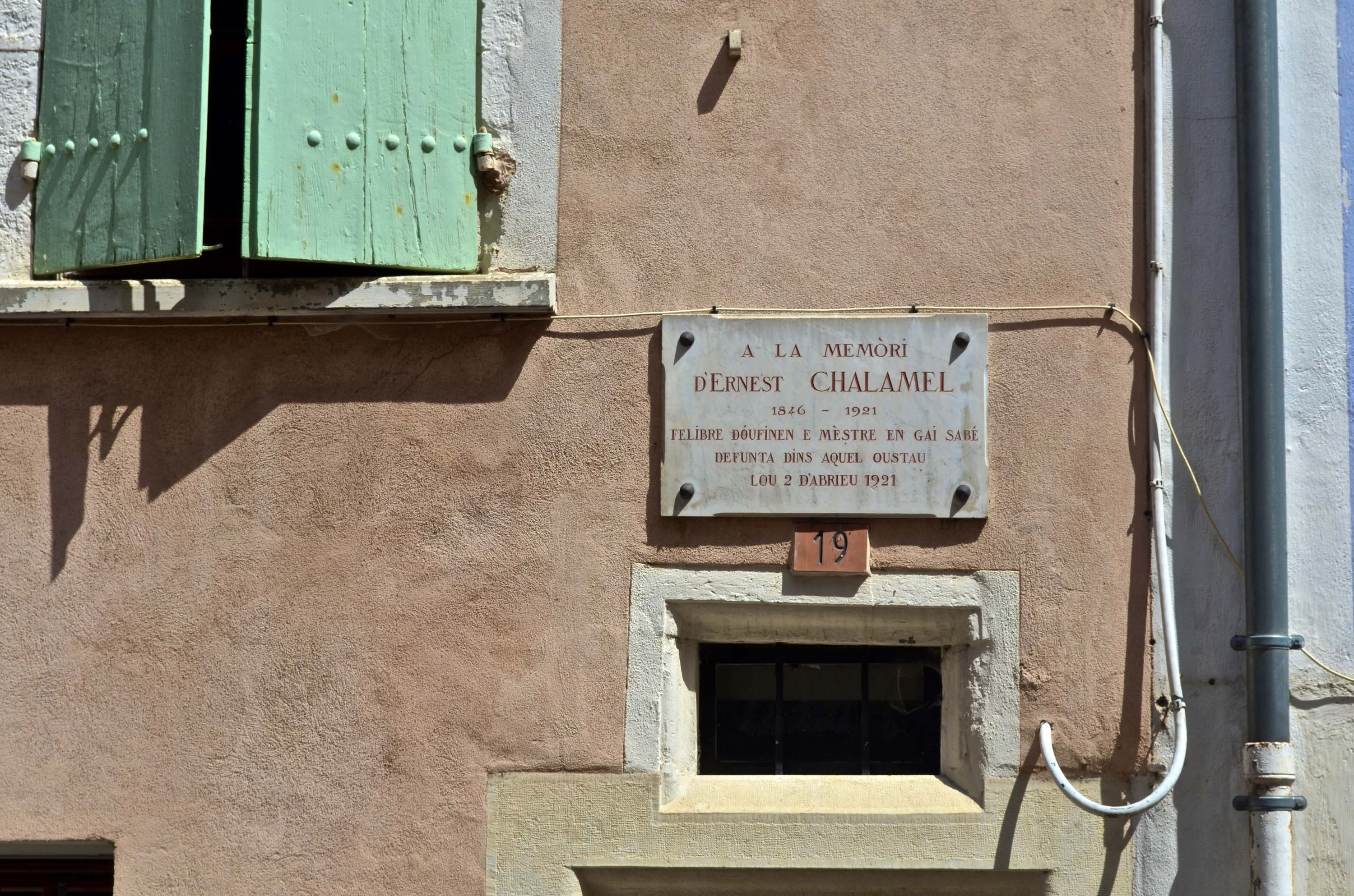 Plaque commémorant le félibre Ernest Chalamel, à Dieulefit (Drôme)